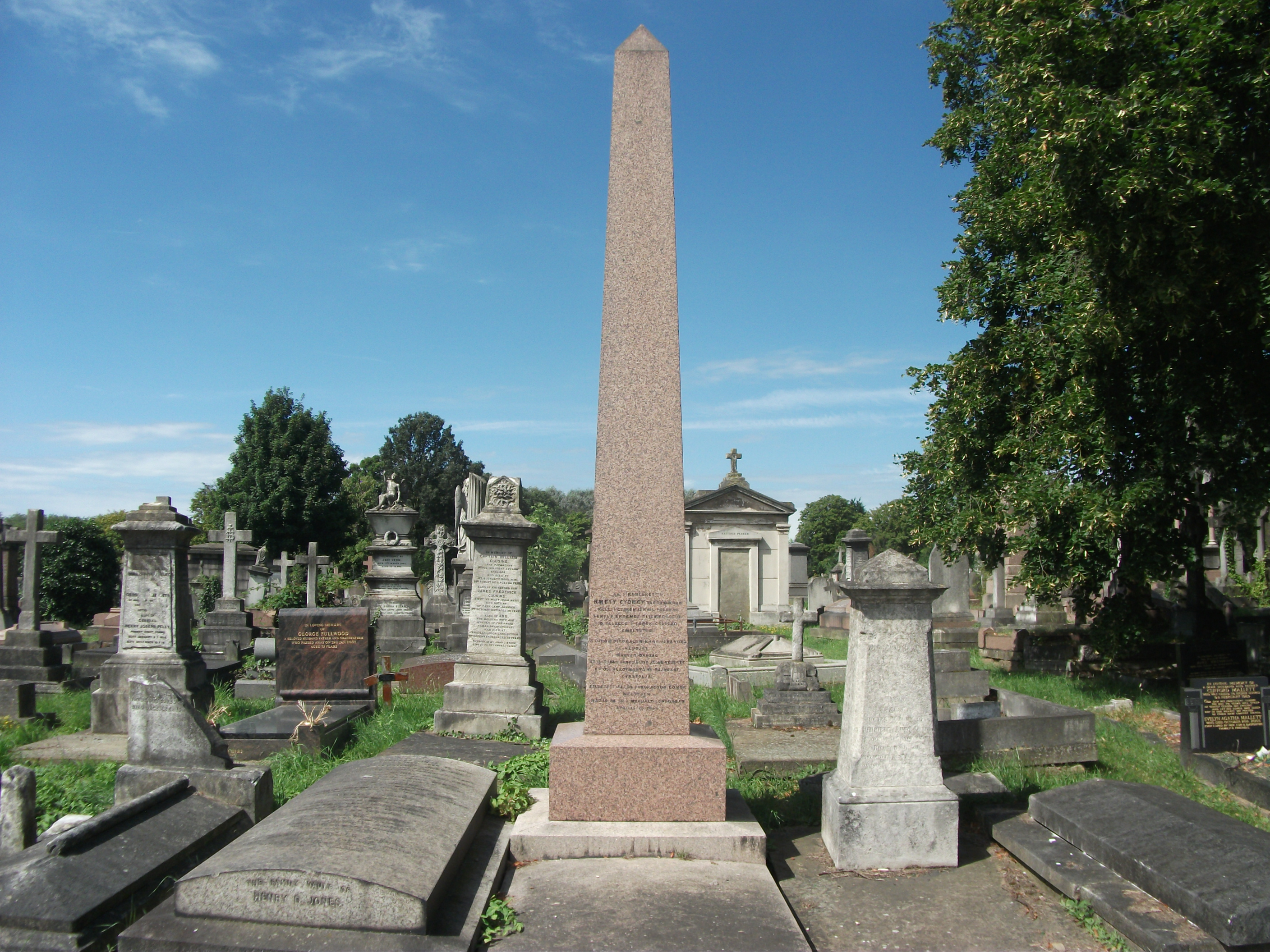 Kmety György síremléke a londoni Kensal Green temetőben